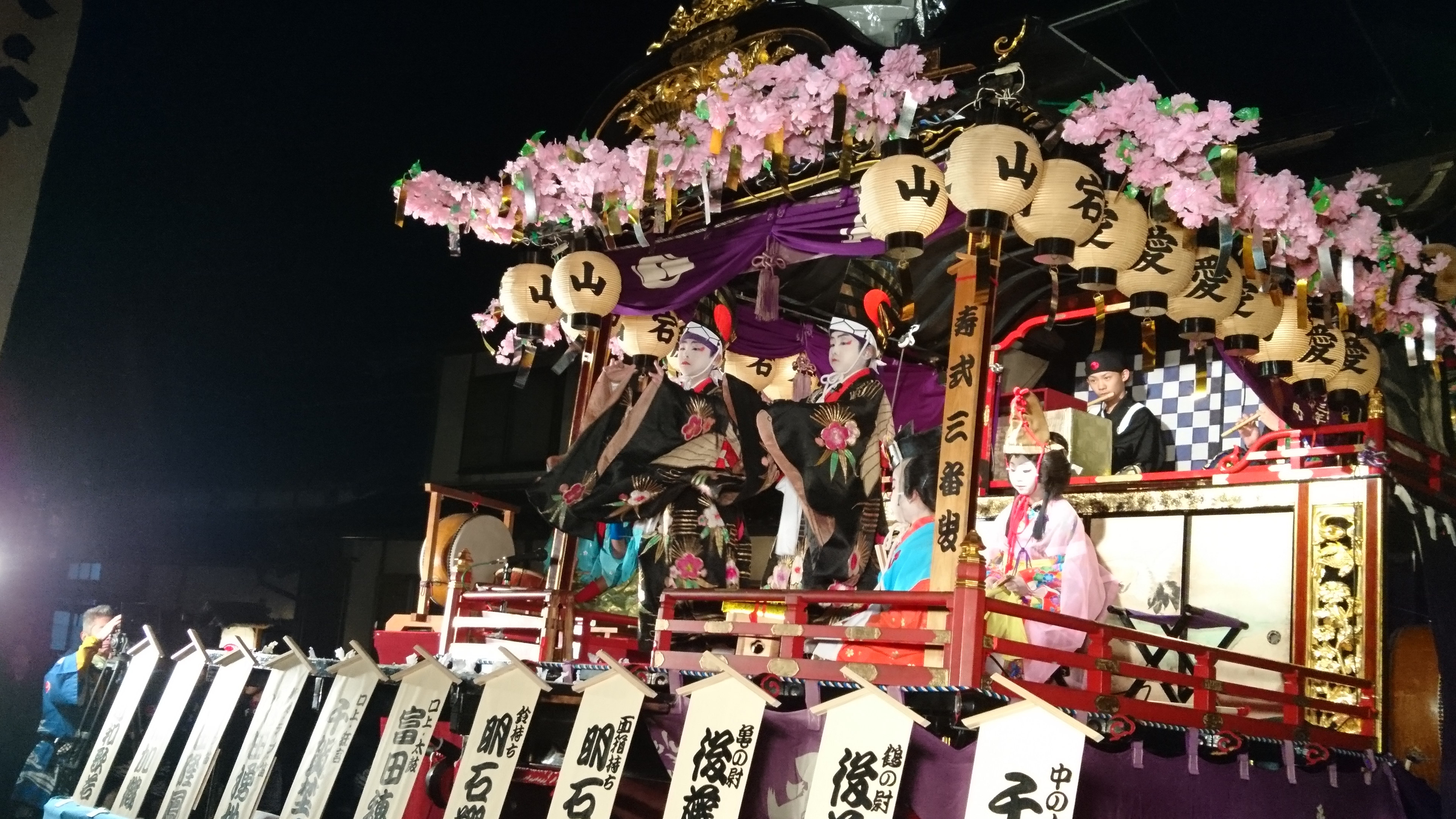 与謝野町後野地区の愛宕神社の祭礼 加悦谷祭 愛宕子ども歌舞伎